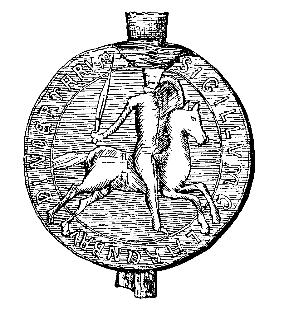 Sceau de Clérambaud de Noyers (Yonne)